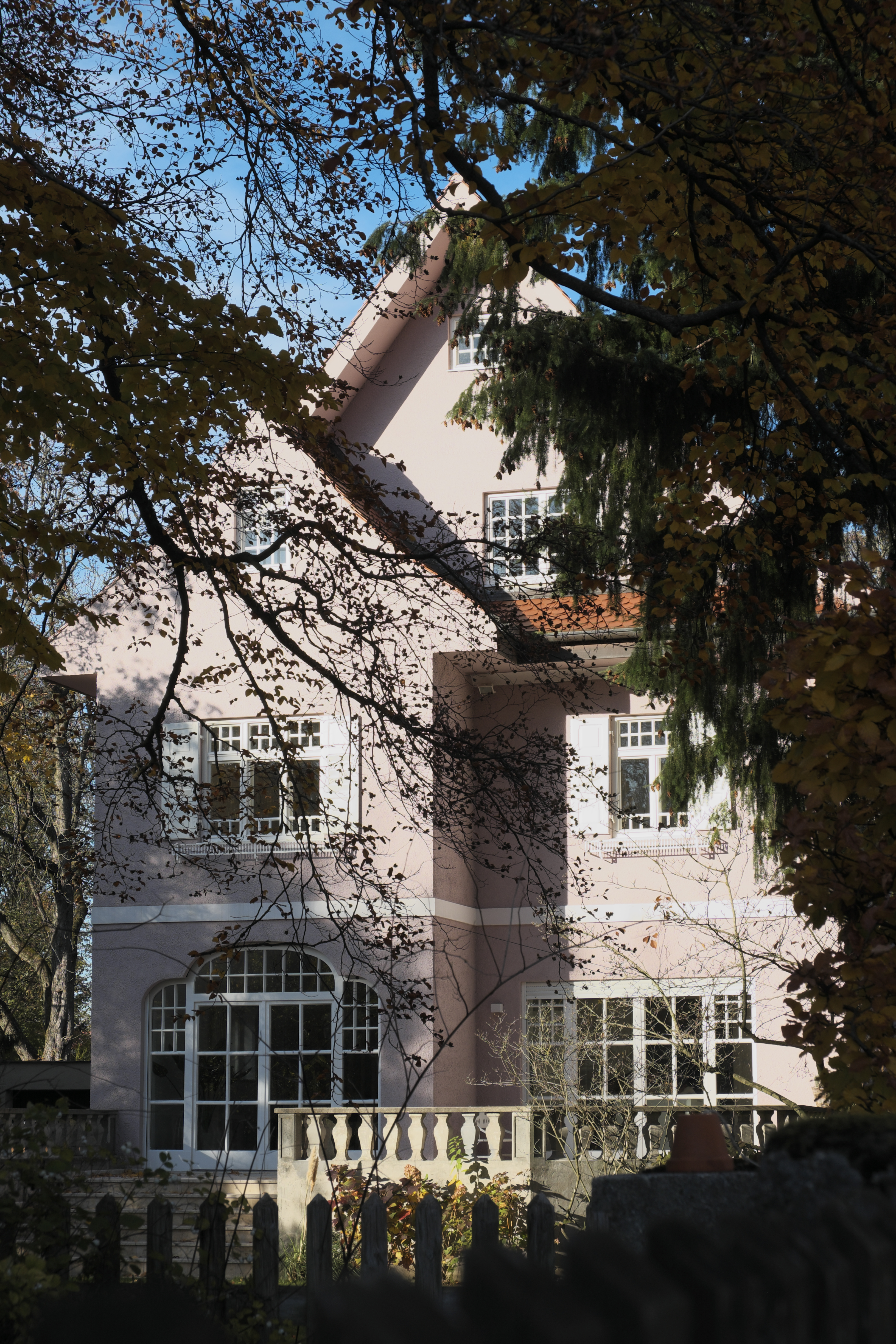 Villa in der Marsopstraße 8b in Obermenzing im Stadtbezirk Pasing-Obermenzing in München, 1908 von Stadler und Necker erbaut